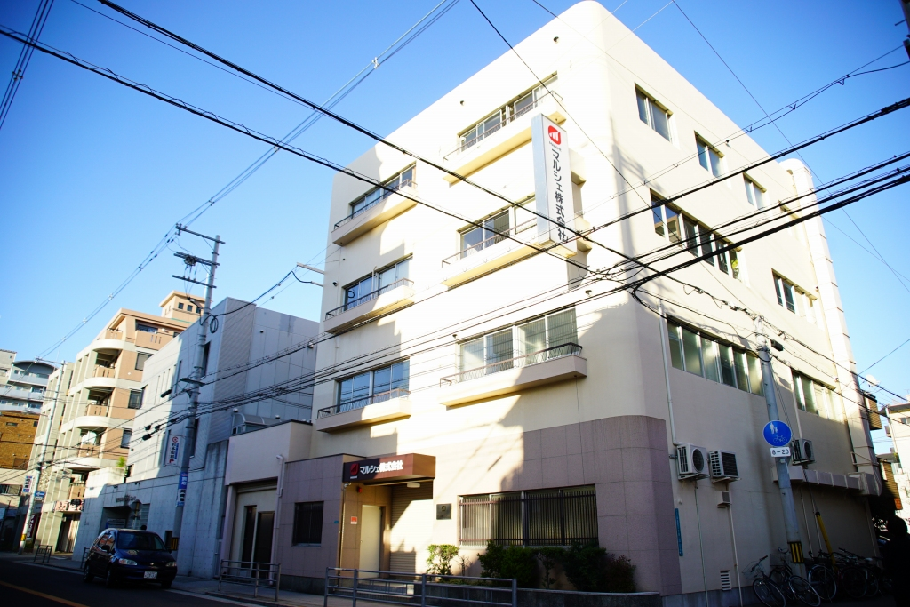 マルシェ株式会社本社